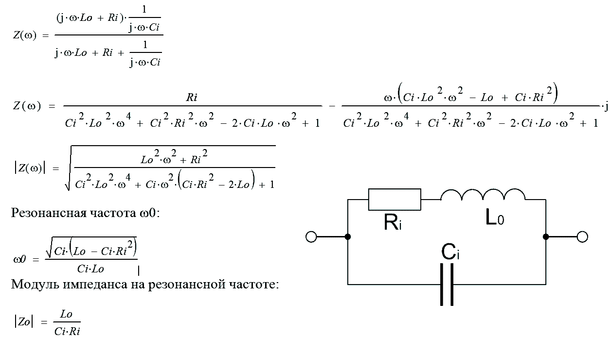 Model of real Inductor & formulae